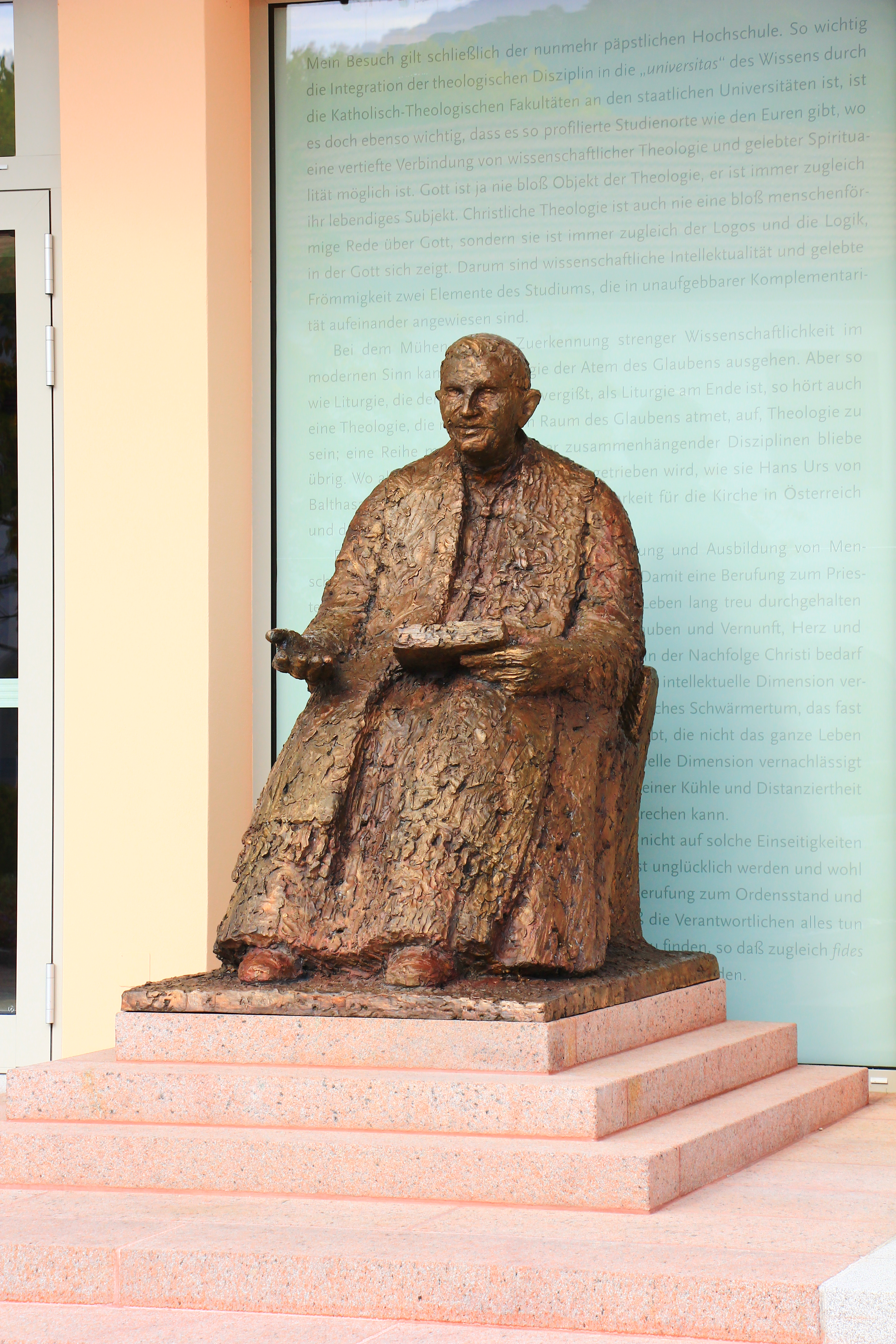 Bronzestatue Benedikt XVI. vor der Theologischen Hochschule im Stift Heiligenkreuz, errichtet von Pater Raphael Statt